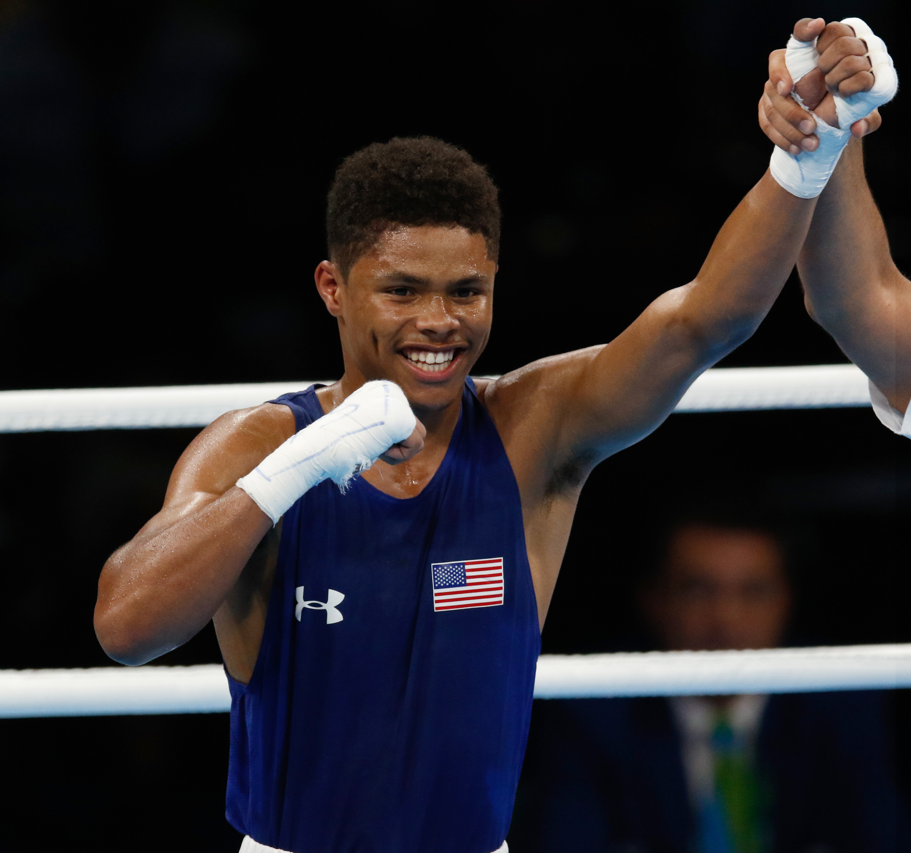 Rio de Janeiro - Boxeador brasileiro Robenilson de Jesus sofre derrota para o norte-americano Shakuer Stevenson na categoroa at 56kg. (Fernando Frazão/Agência Brasil)